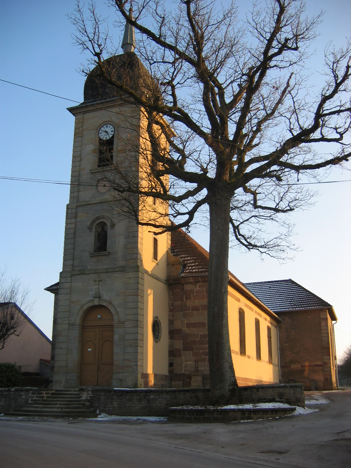 Église St Guérin - Claudon (88)